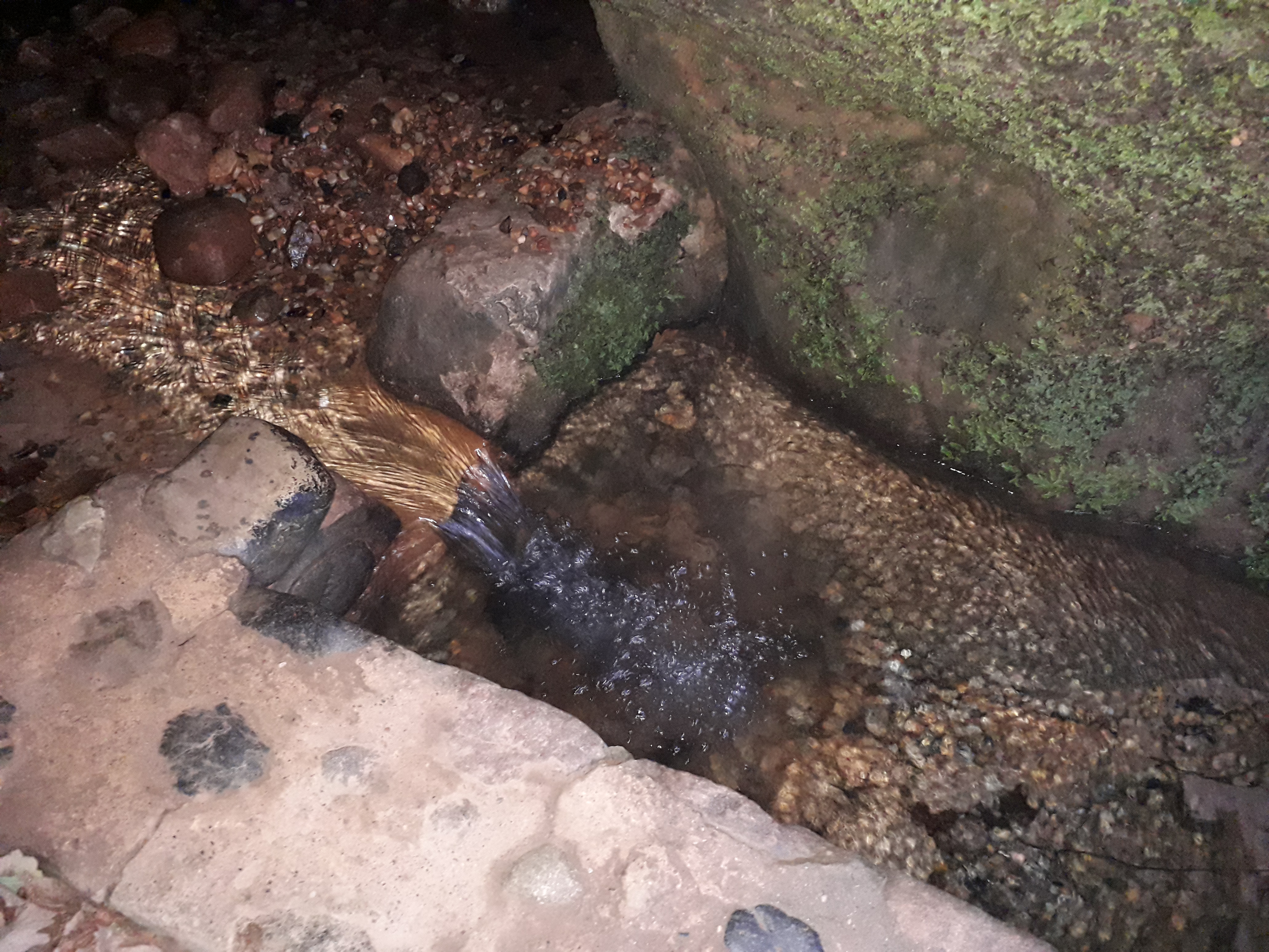 Gutmanala Grotte mit Quelle